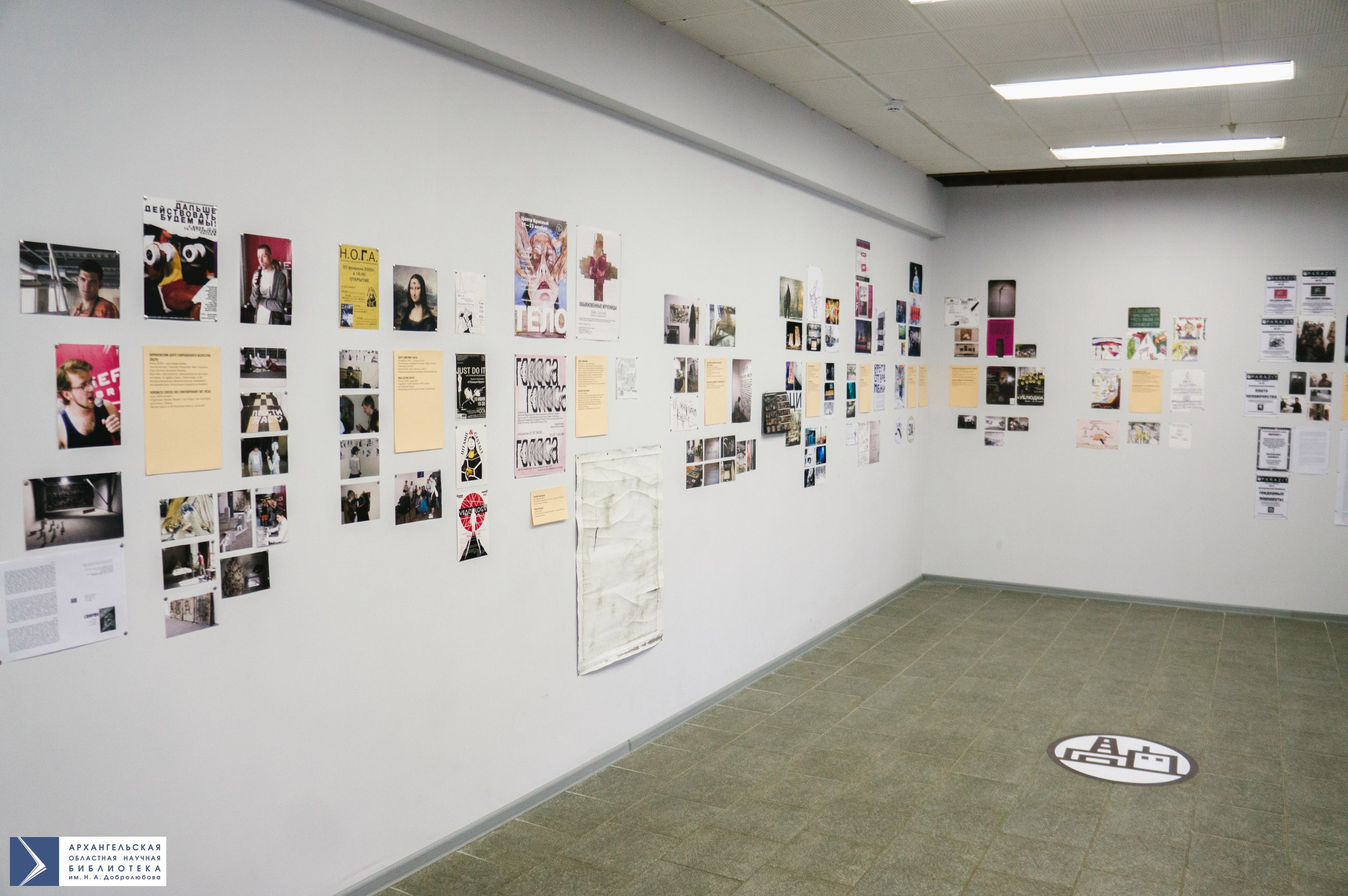 Выставка "Открытые системы". Музей современного искусства "Гараж". Сбор материалов от Мурманской и Архангельской областей - Арктический институт искусств. в АОНБ им. Н. А. Добролюбова (Архангельск)